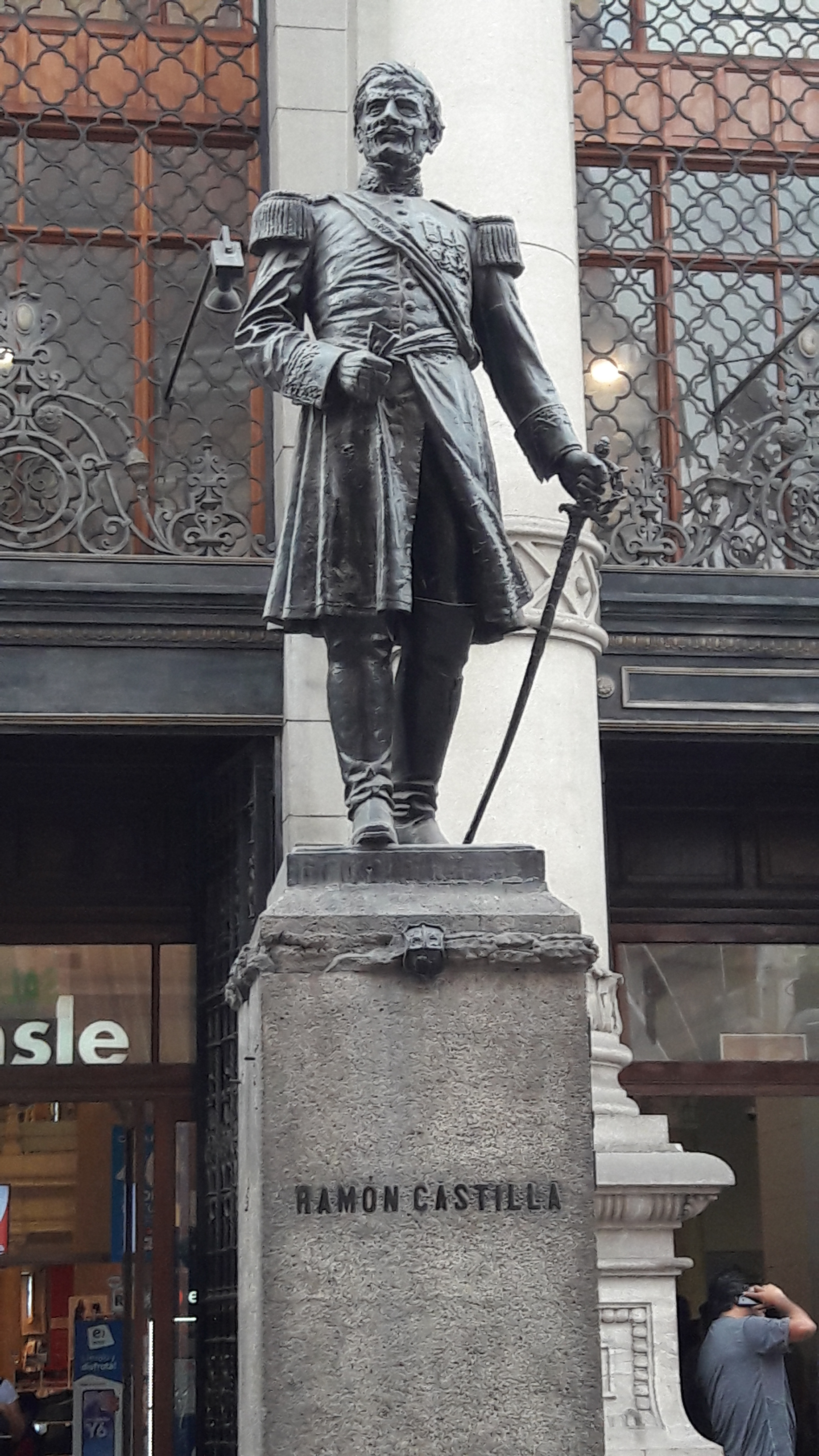 Escultura de Ramón Castilla en Jiron La Unión